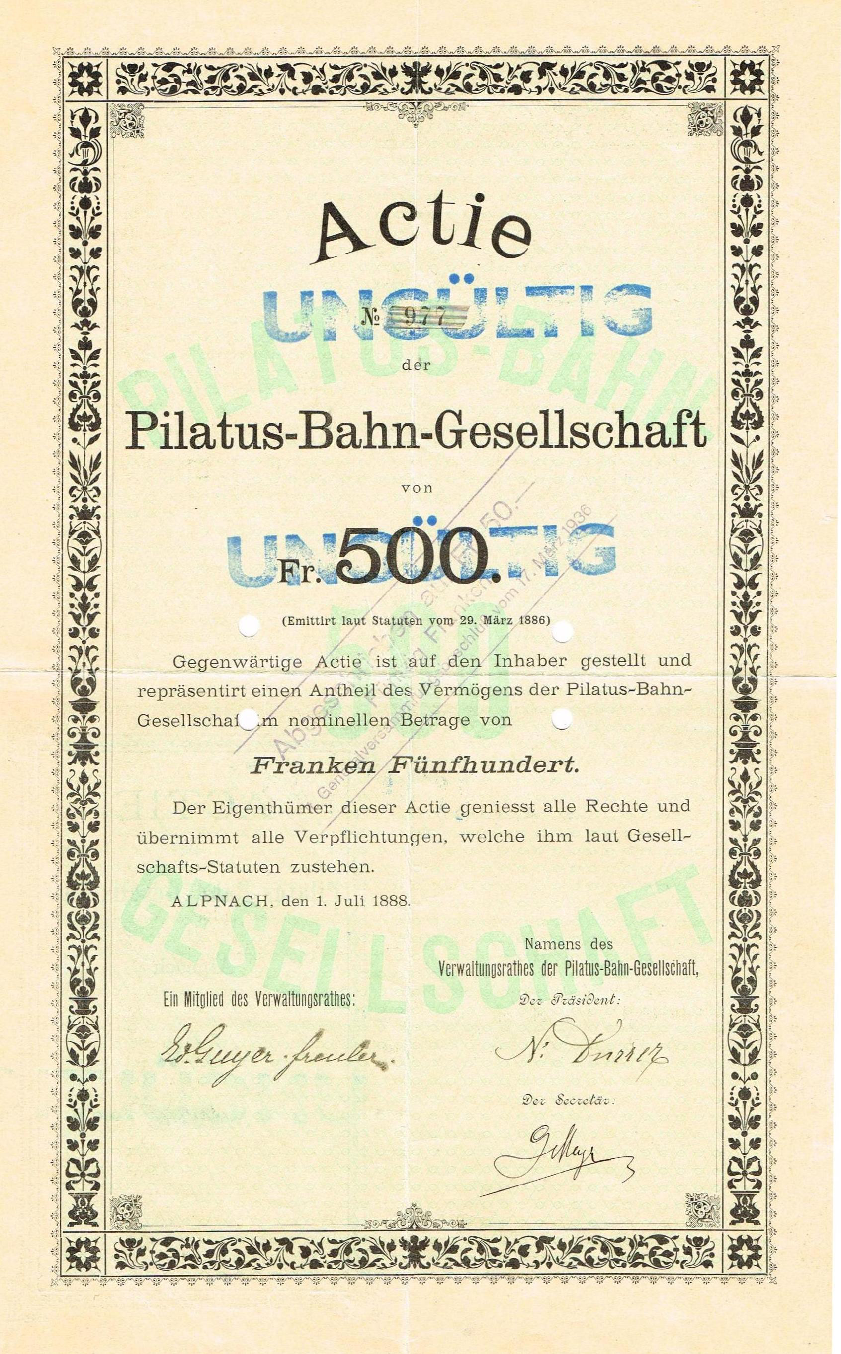 Aktie über 500 Franken der Pilatus-Bahn-Gesellschaft vom 1. Juli 1888; Gründerstück. Originalunterschriften der beiden Bahnpioniere Ed. Guyer-Freuler und N. Durrer. 1936 erfolgte die Kapitalreduktion auf 50 Franken; Seit 1889 führt die noch heute steilste Zahnradbahn der Welt auf den Pilatus bei Luzern. Um auf eine Höhe von über 2'100 Metern zu gelangen, muss eine Steigung von zeitweise 48% überwunden werden. Dies schaffte nicht einmal Riggenbachs Zahnradsystem. Für die Pilatus-Bahn-Gesellschaft entwickelte der Konstrukteur Eduard Locher eine eigene Zahnstange, die er im Jahr der Eröffnung auch an der Weltausstellung von Paris präsentierte.